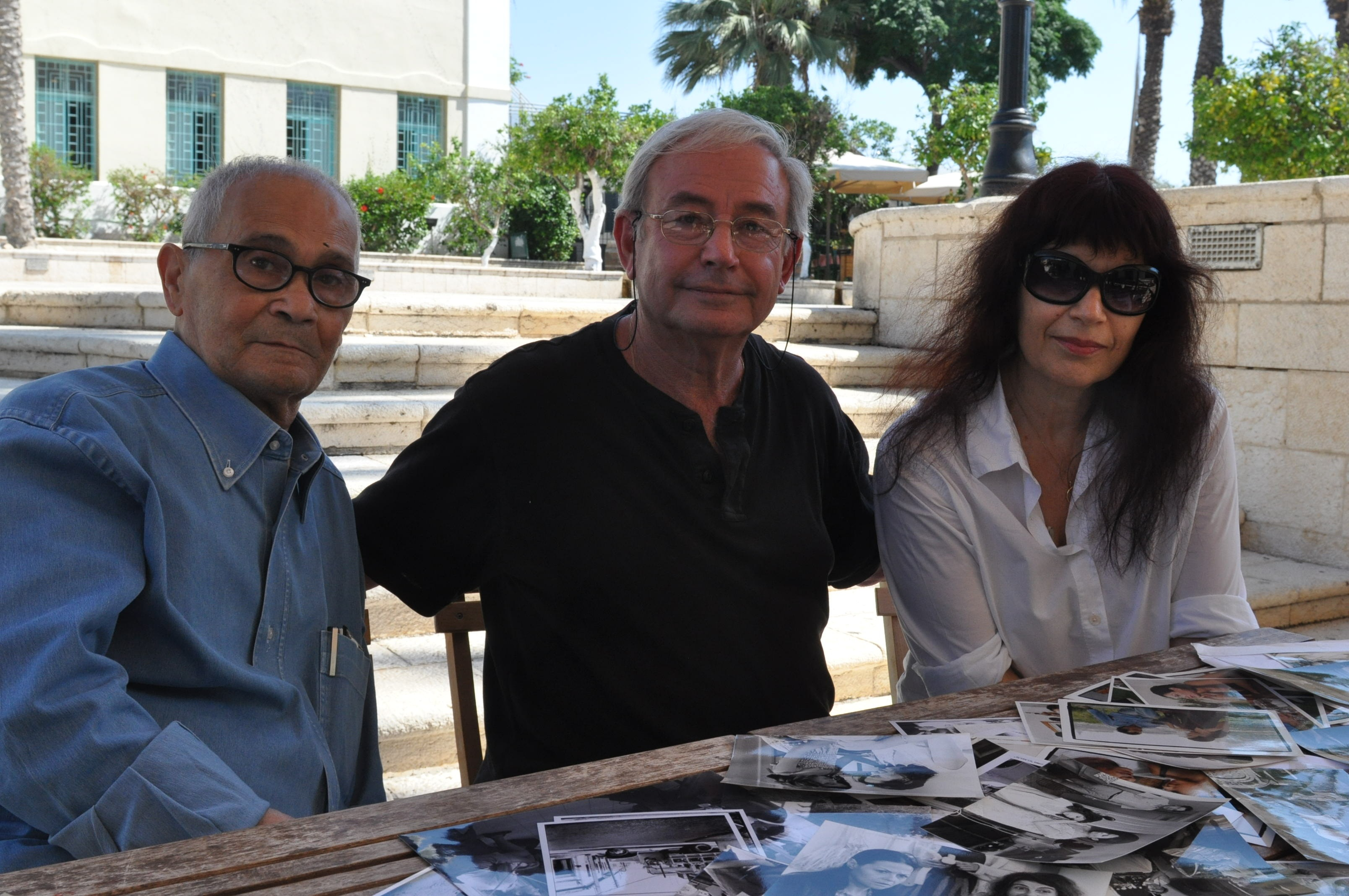 מתוך הסרט התיעודי "מבעד לעיניים – יוני המנחם"